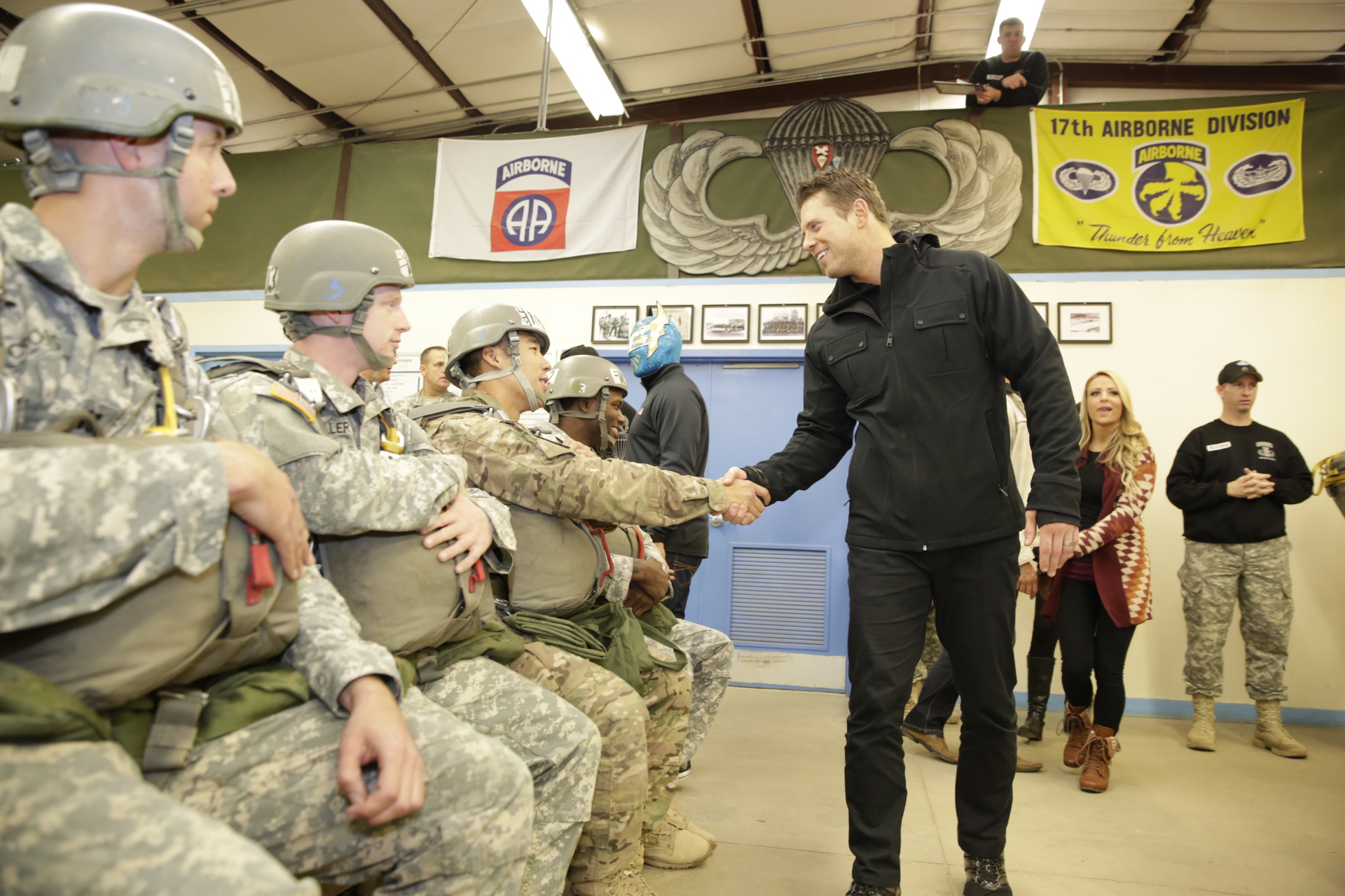 006_Tribute_12092014ca_221